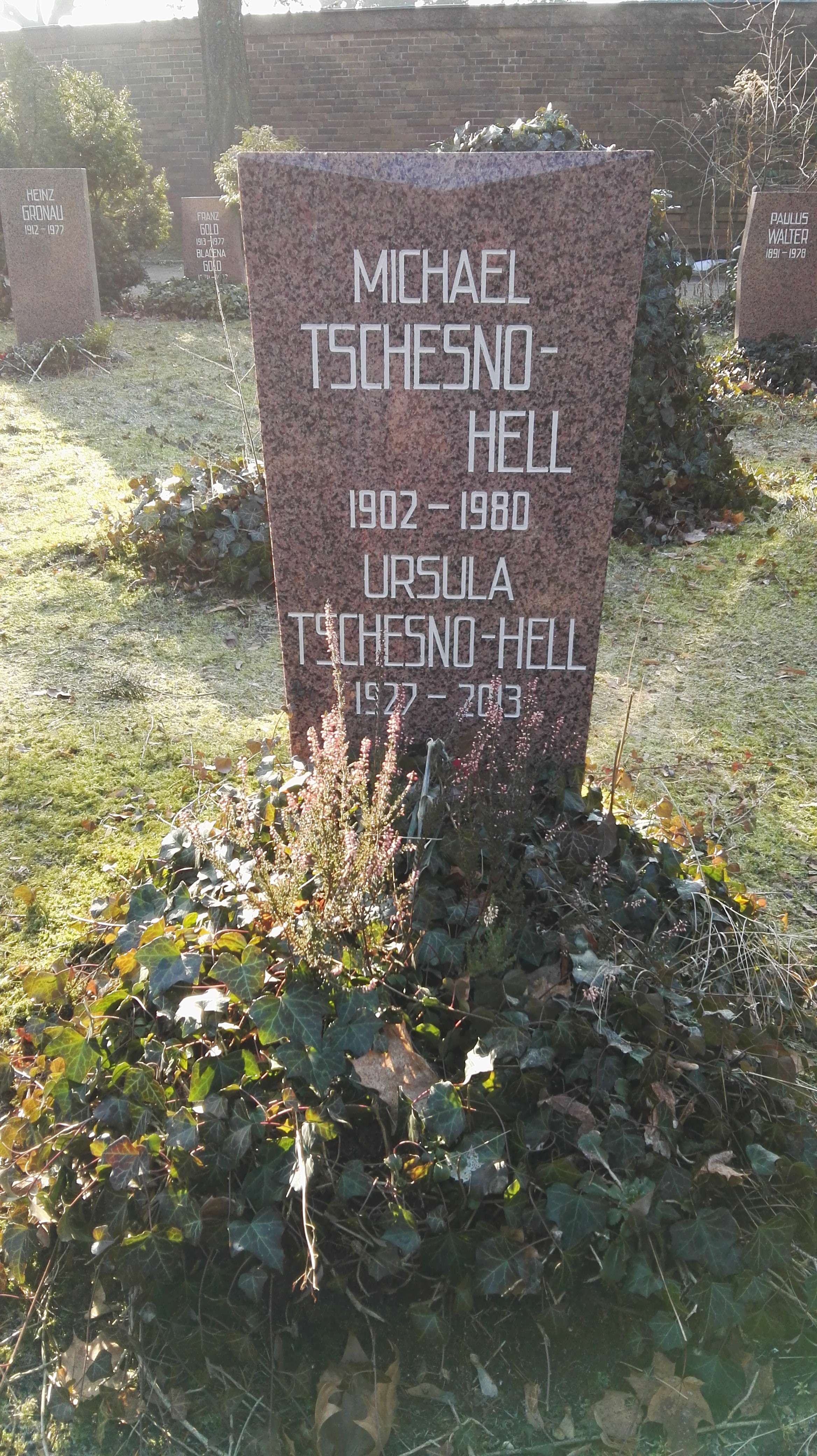 Grab von Michael Tschesno-Hell und Ursula Tschesno-Hell in der Grabanlage Pergolenweg auf dem Sozialistenfriedhof des Zentralfriedhofs Friedrichsfelde